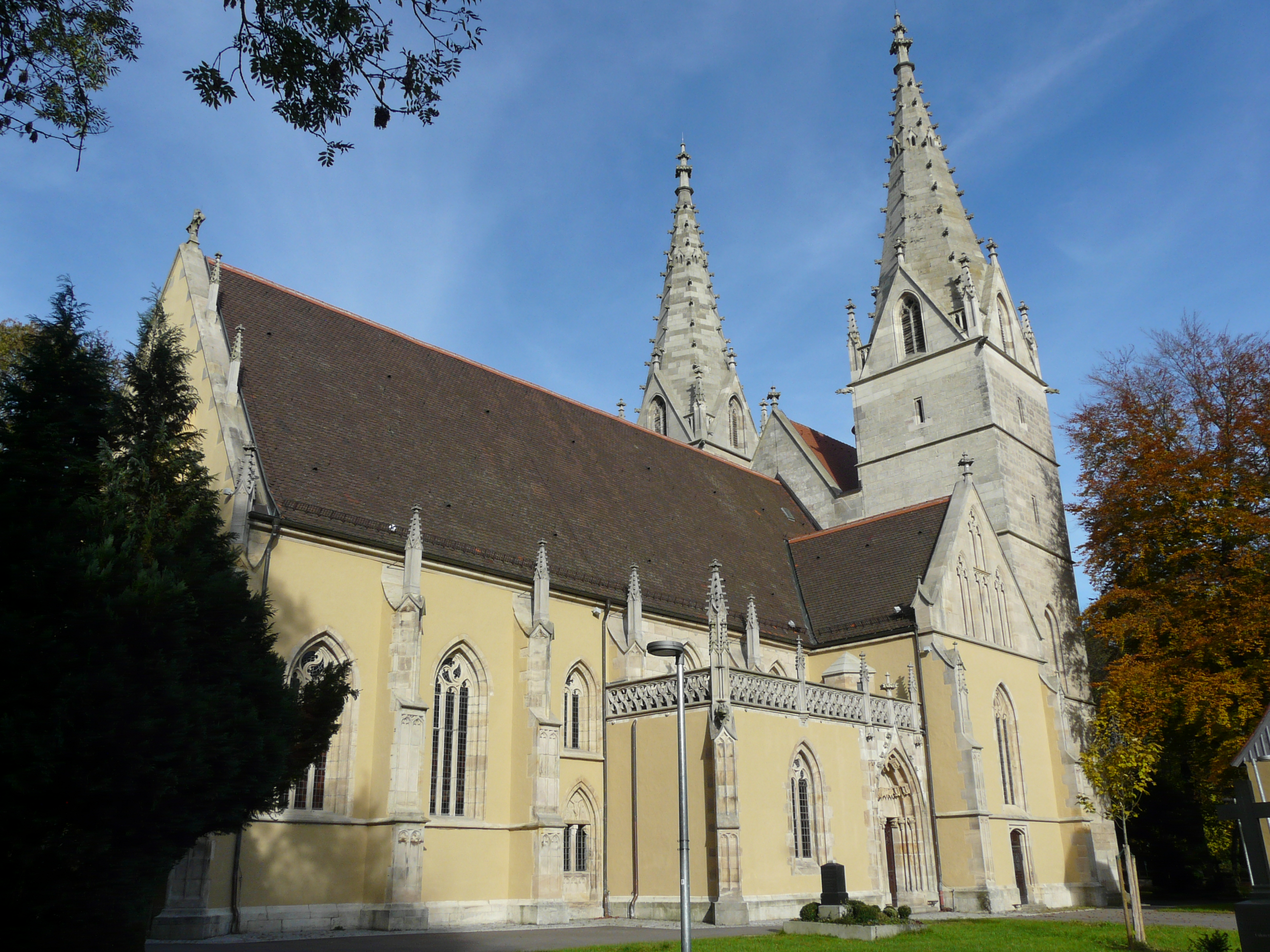 Bildinhalt: Oberhofenkirche, außen Aufnahmeort: Göppingen, Deutschland